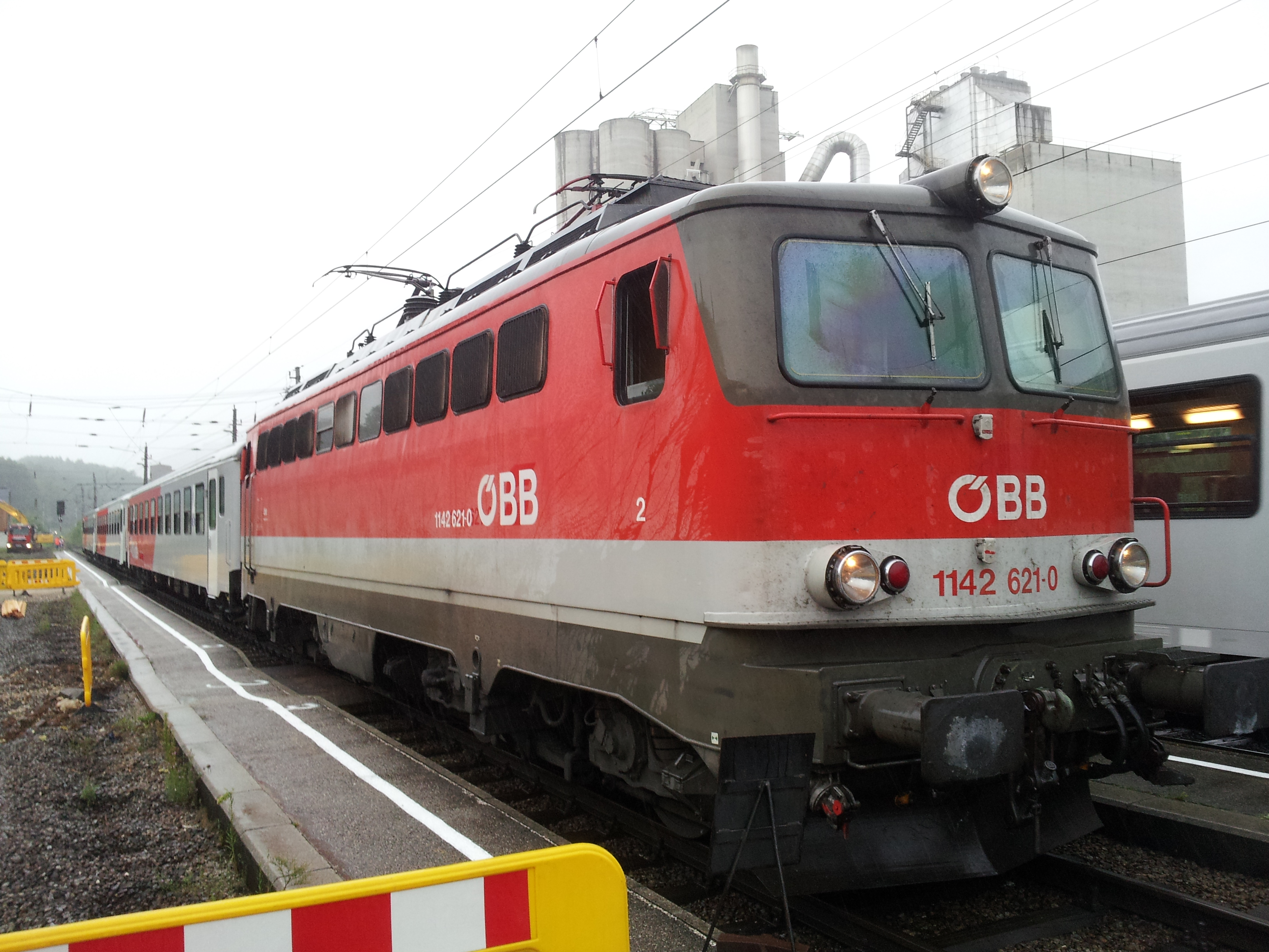 ÖBB 1142.621 im Bahnhof Gmunden